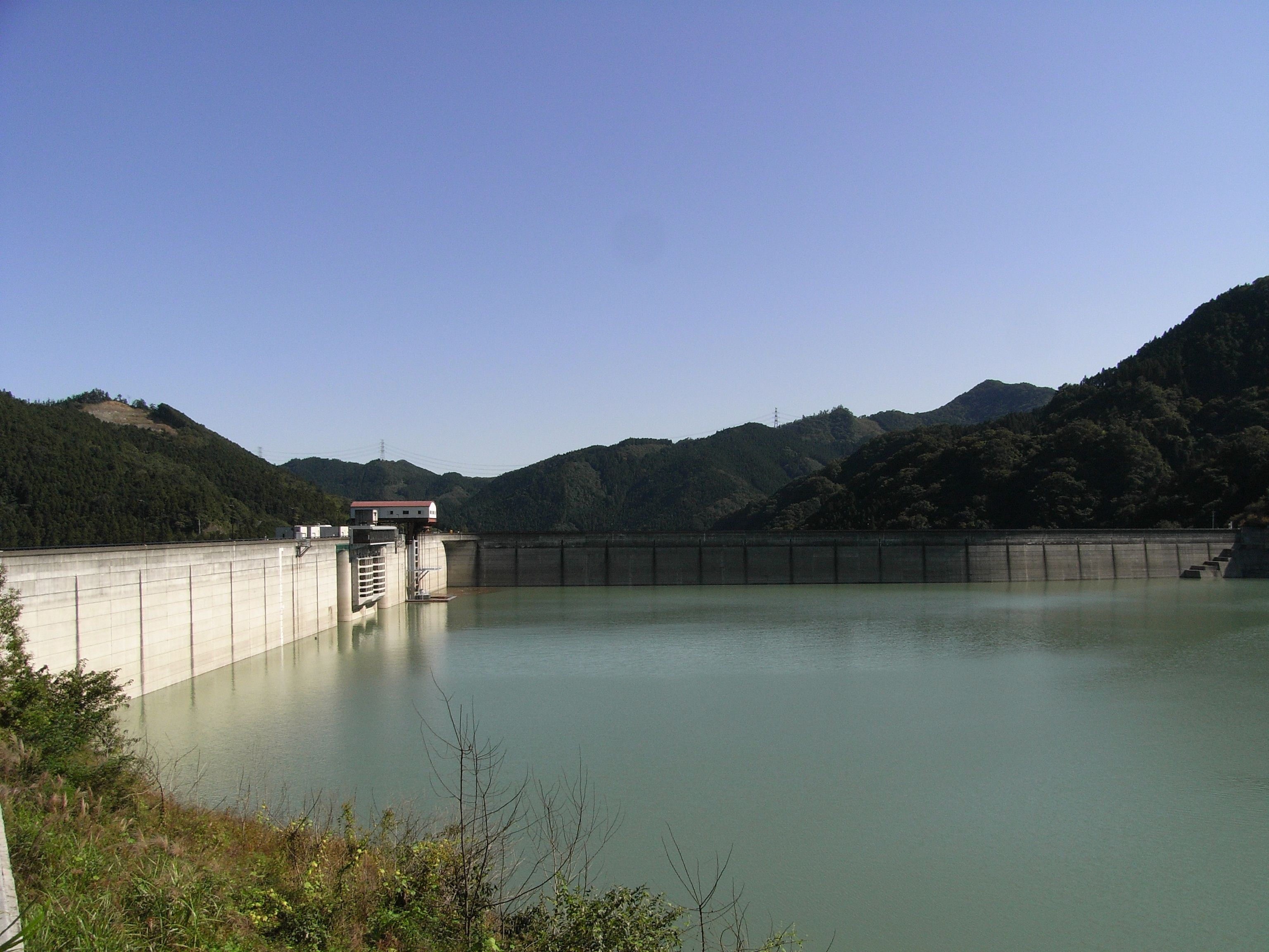 Dam